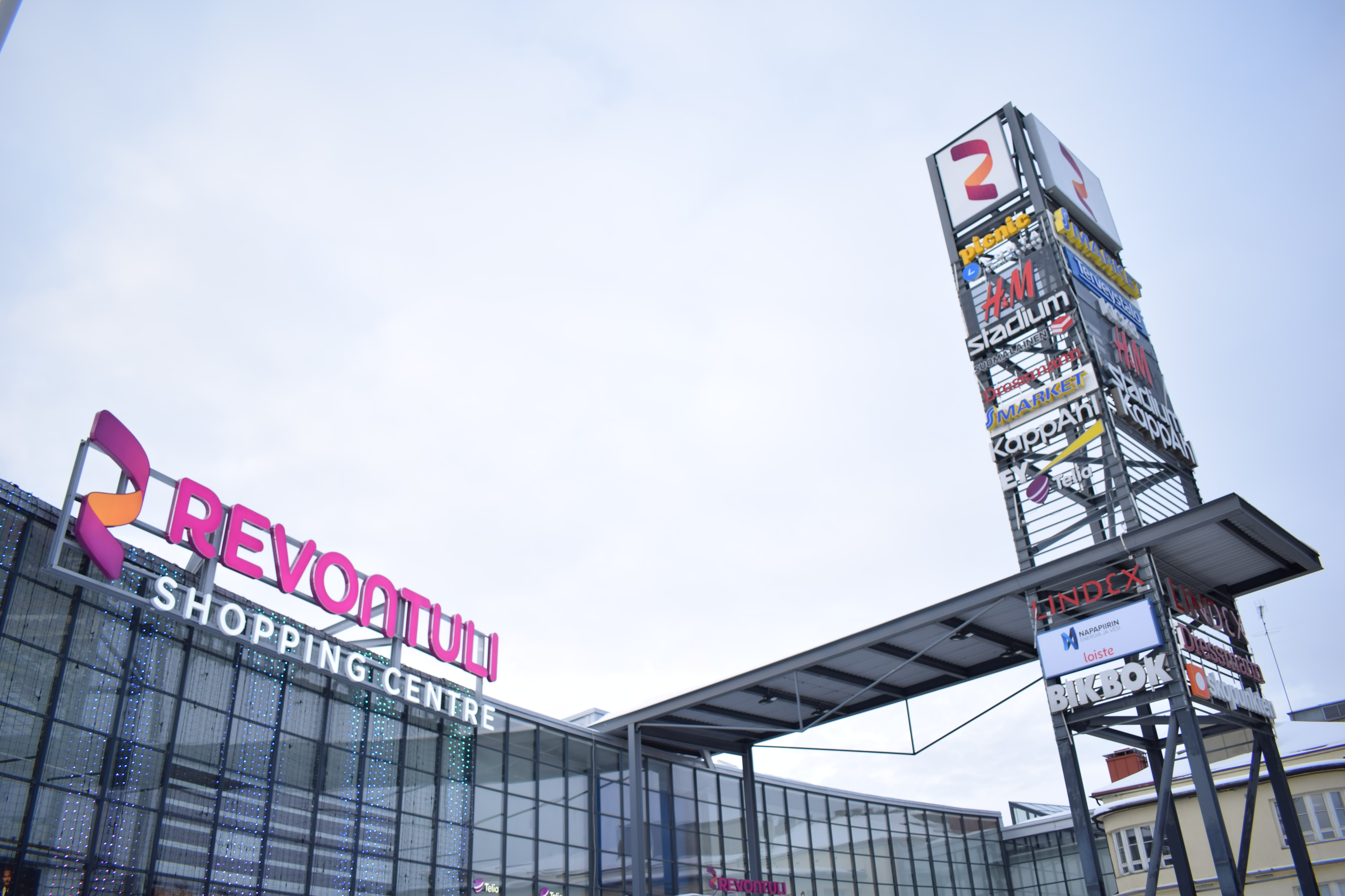 Kauppakeskus Revontuli, Rovaniemi.